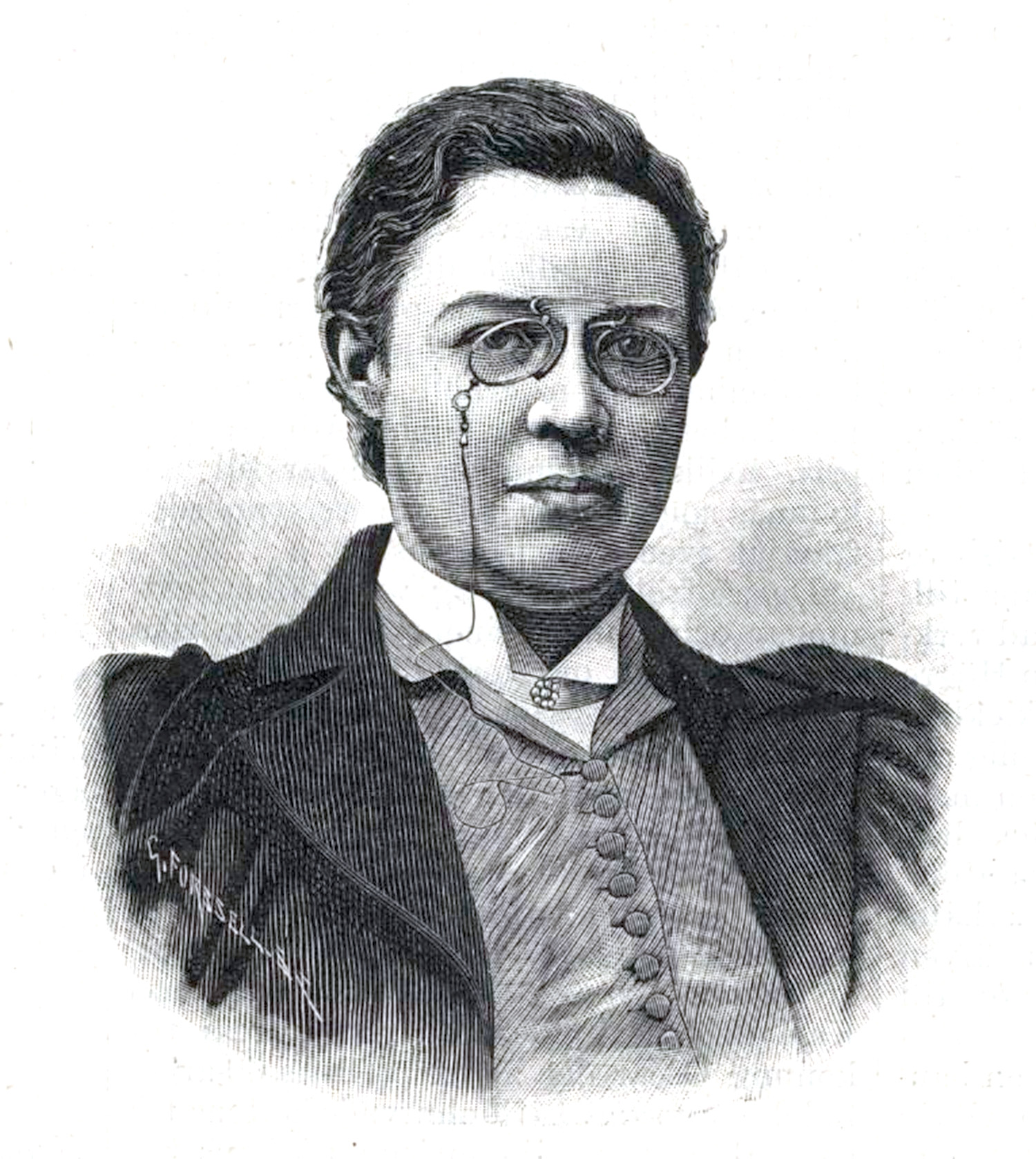 Sofia Gisberg (1854-1926)